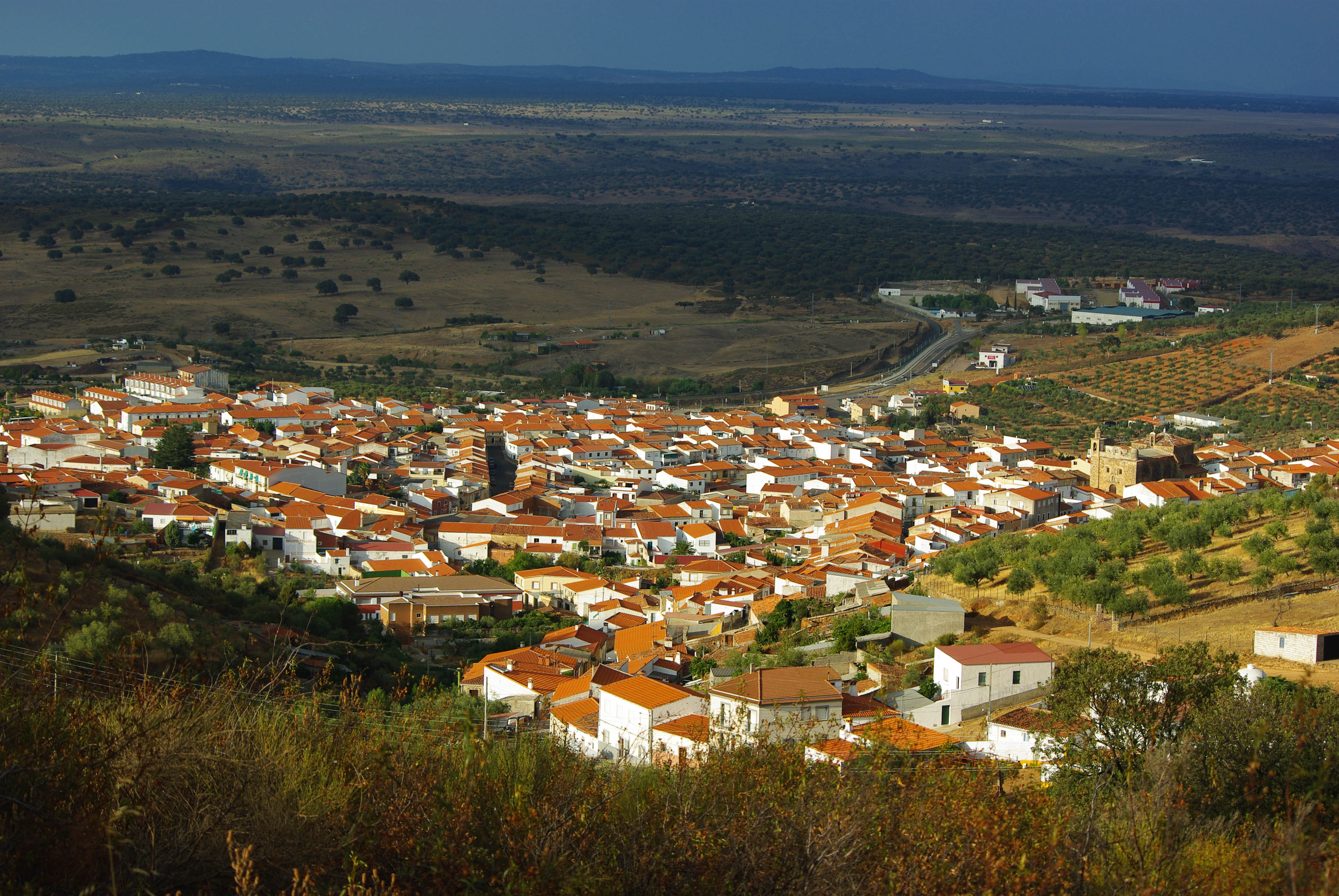 Vista panorámica de Aliseda, provincia de Cáceres, España.